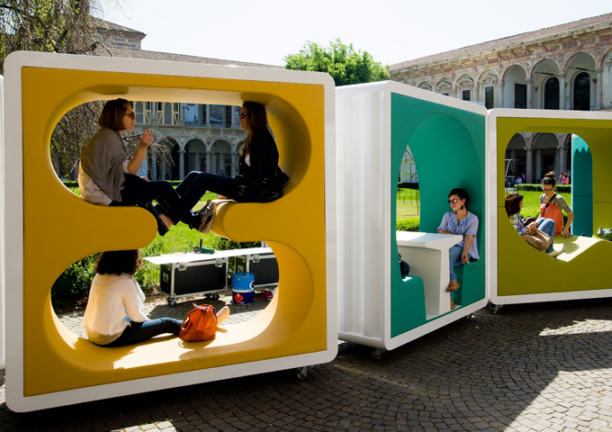 LIBERO